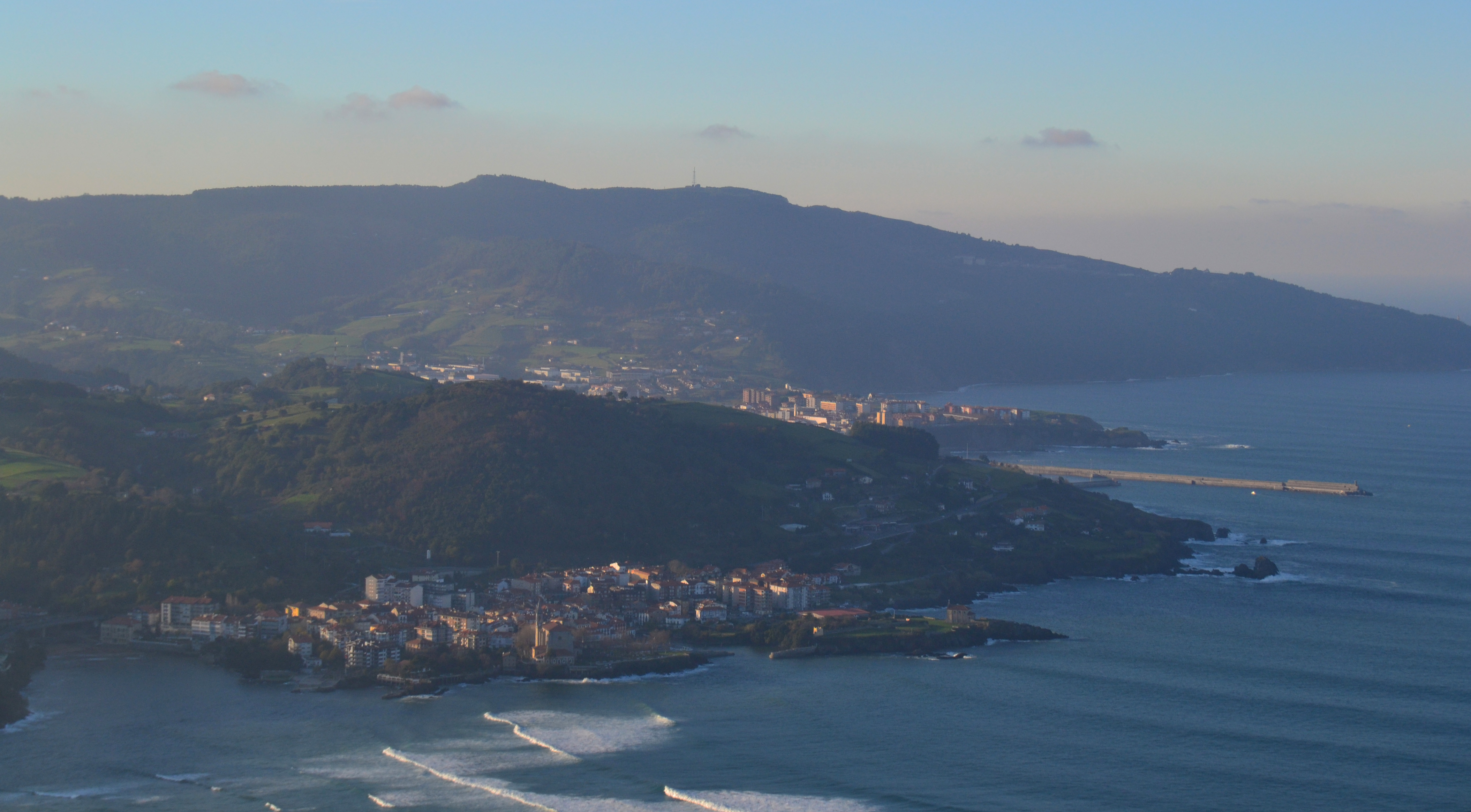 Mundaka udalerria Atxarre menditik. Bizkaia, Euskal Herria. Mundaka village from Atxarre mountain. Bizkaia, Basque Country.